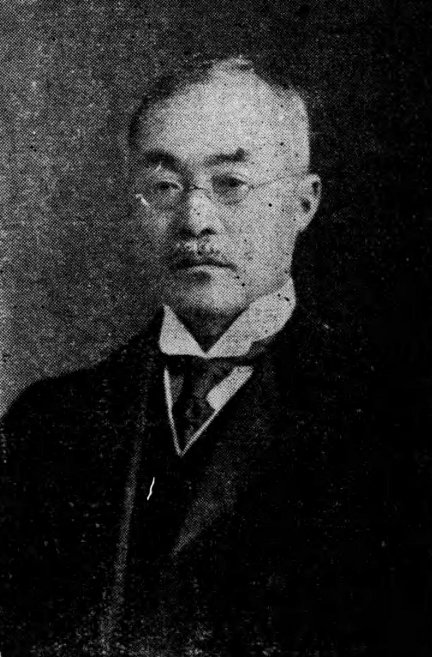 関野貞（1868-1935）